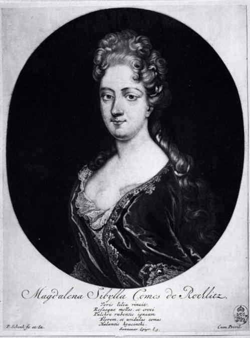 Magdalena Sibylle Reichsgräfin von Rochlitz